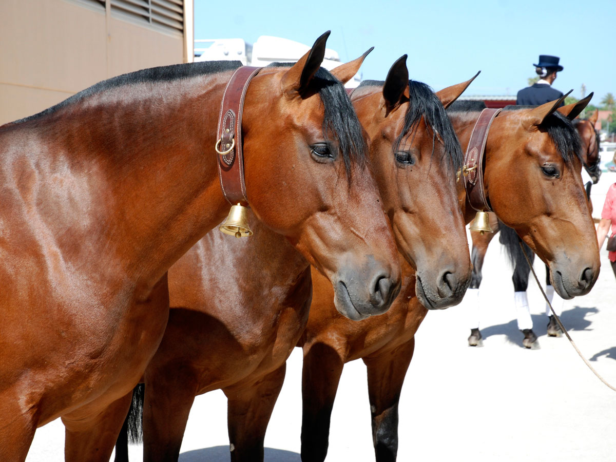 Cobra de juments PRE baies présentées à Valence en avril 2013.